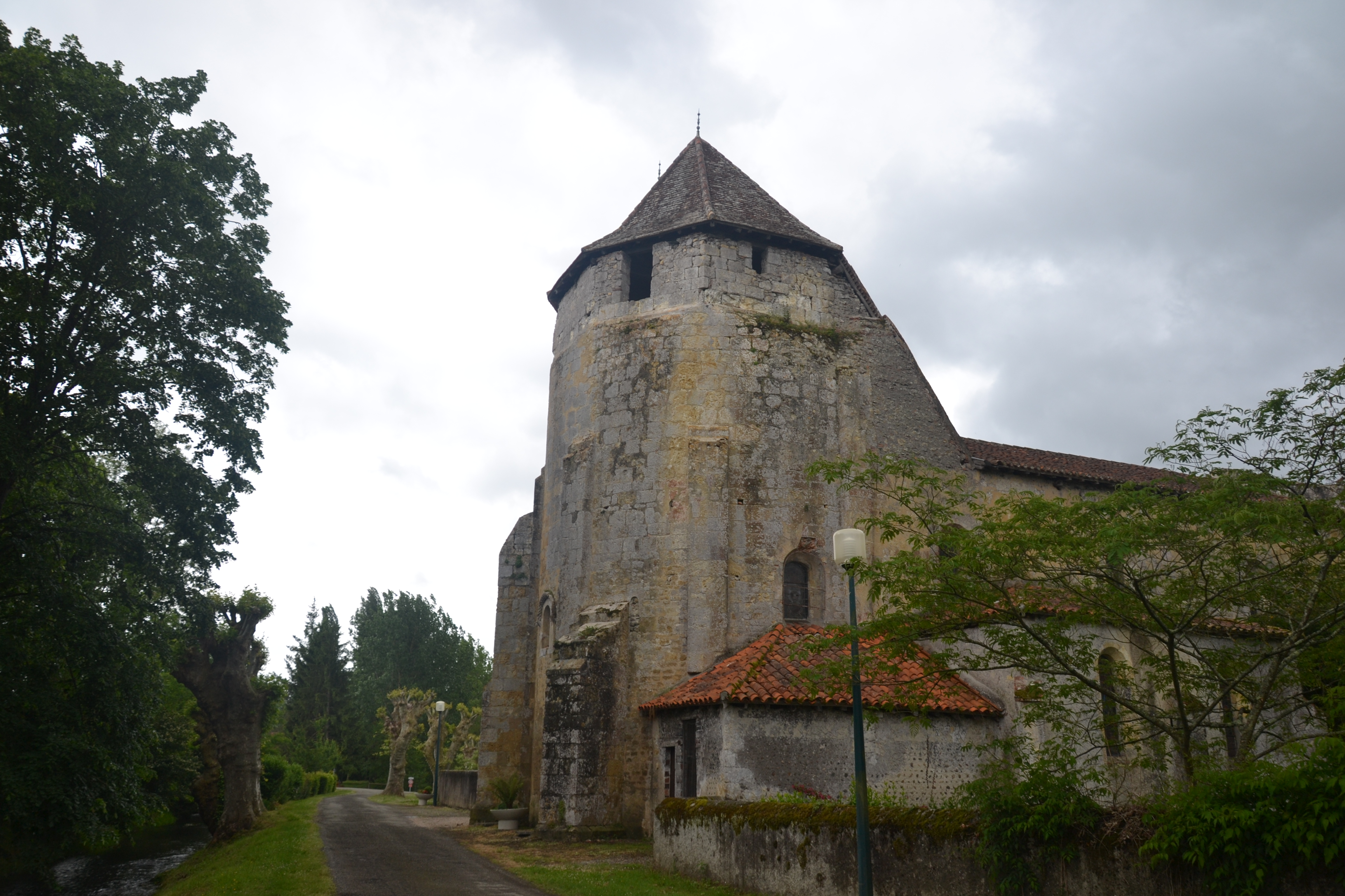 Église Saint-Jean-Baptiste de Préchac-sur-Adour